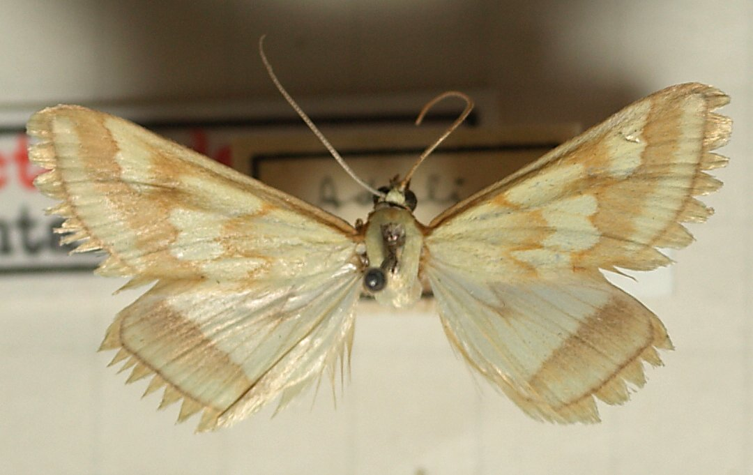 Ephelis cruentalis